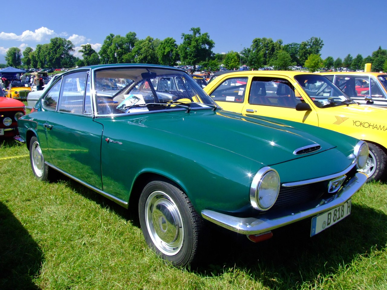 Quelle: selbst fotografiert, 06/2007 Fotograf: Späth Chr.